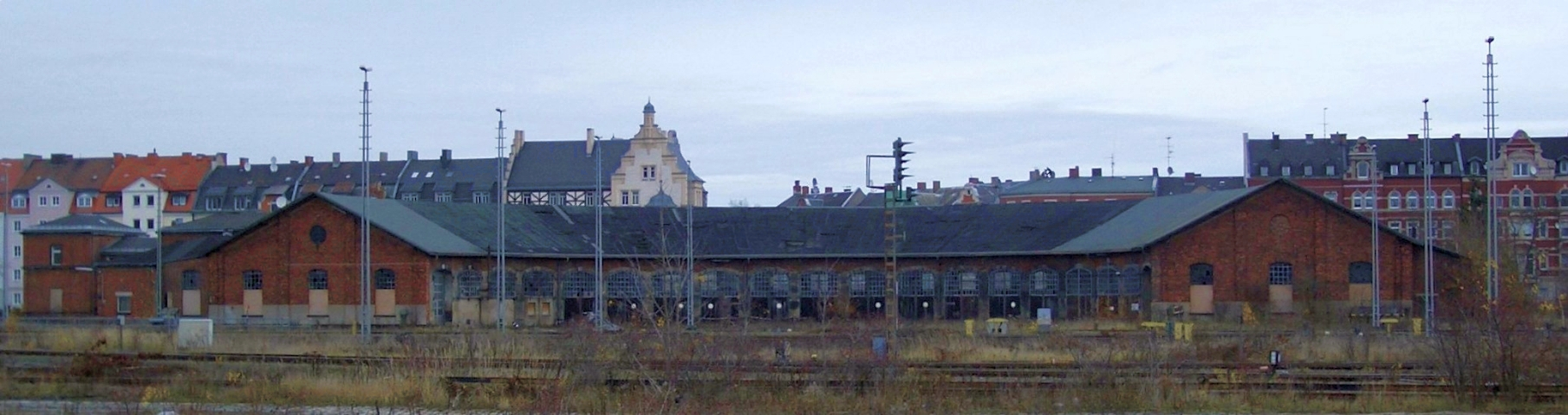 Ringlokschuppen im nördlichen, ehemals sächsischen Teil des Hofer Hauptbahnhofs selbst aufgenommen im Herbst 2006